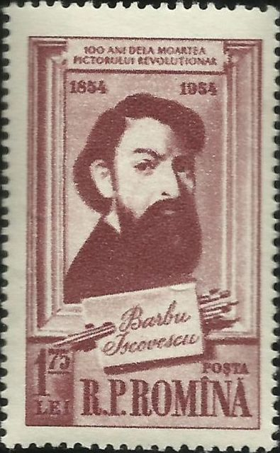 Timbru cu portretul lui Barbu Iscovescu emis în anul 1954 la 100 de ani de la moartea artistului.